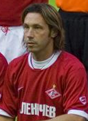 Aleksandr Mostovoi, Russian footballer.